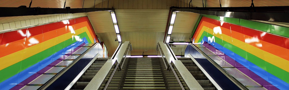 Estación de metro de Chueca decorada con la bandera LGTB